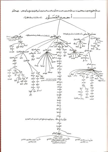 مشجرة أشراف الحجاز الأحمديون من ذيل كتاب بحر الأنساب لأخي الشريف أنس بن يعقوب الكتبي الحسني , كتاب بحر الأنساب : للنجفي تحقيق مع الذيل :الشريف أنس الكتبي الحسني منشورات الخزانة الكتبية الحسنية الخاصة ط1418هـ.